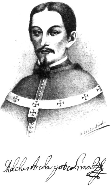 Melchor de Liñán y Cisneros (1629-1708), religioso y político español. Arzobispo de Lima y Virrey del Perú.